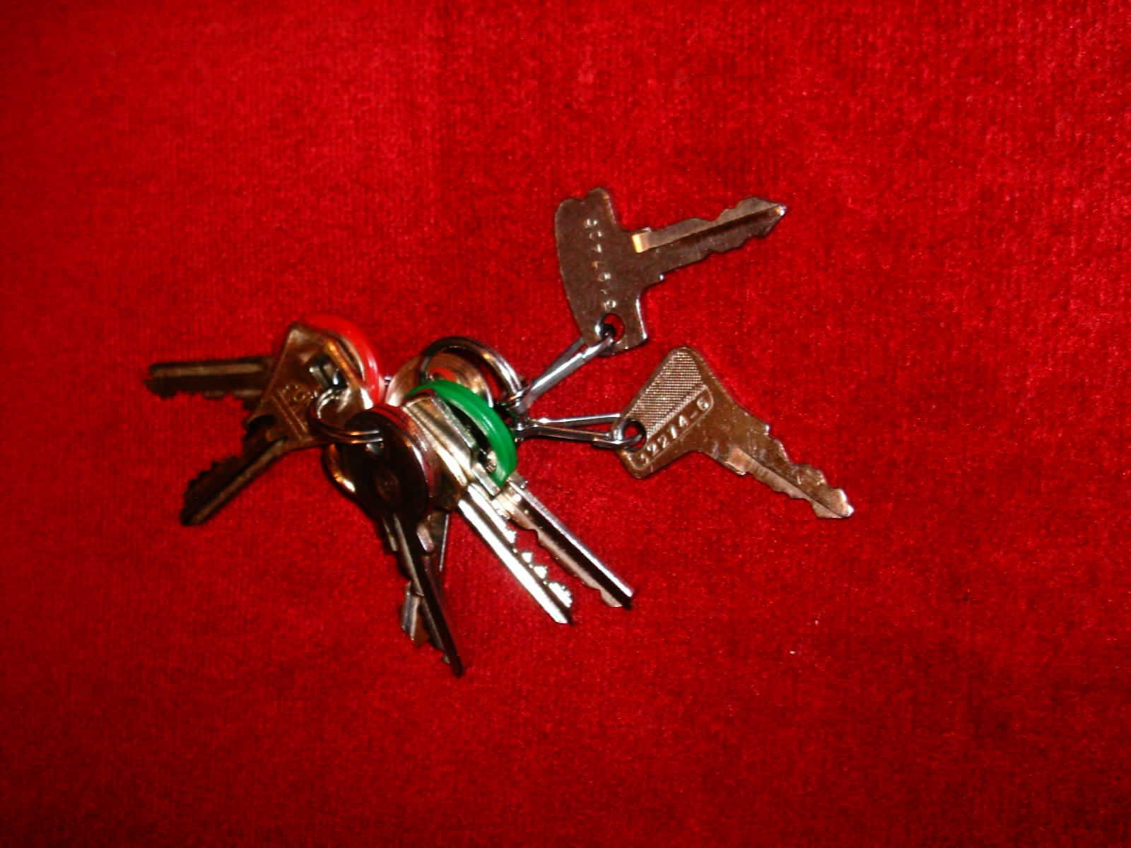 Свежањ кључева.